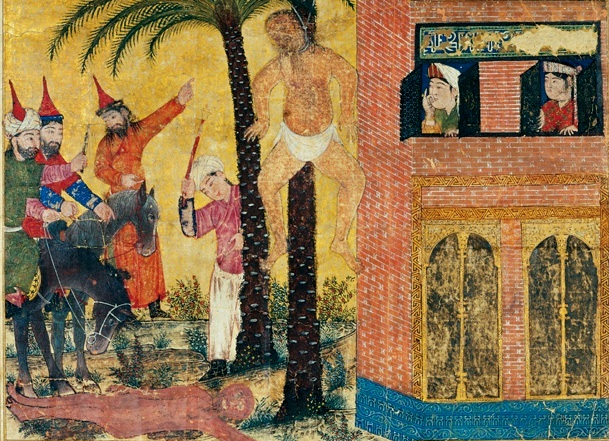 Смерть Мани._Шахнаме Демотта. 1315. Музей Ризы Аббаси.